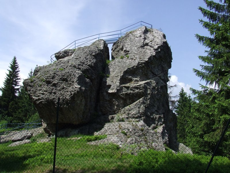 Schneckenkenstein-Felsen